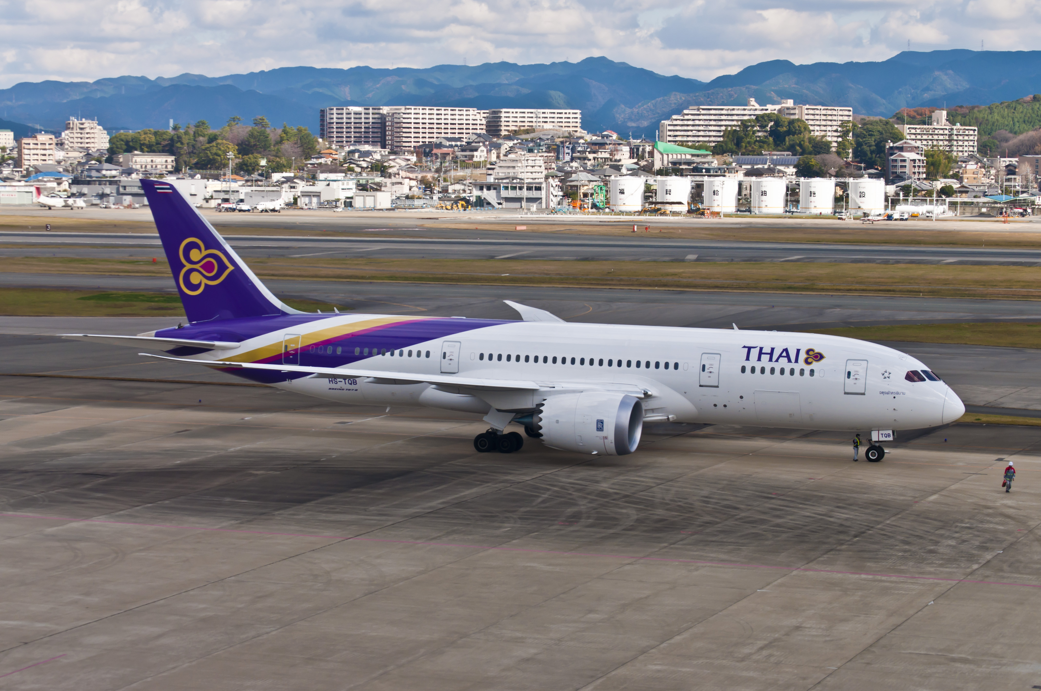 タイ国際航空のボーイング787。福岡空港にて撮影